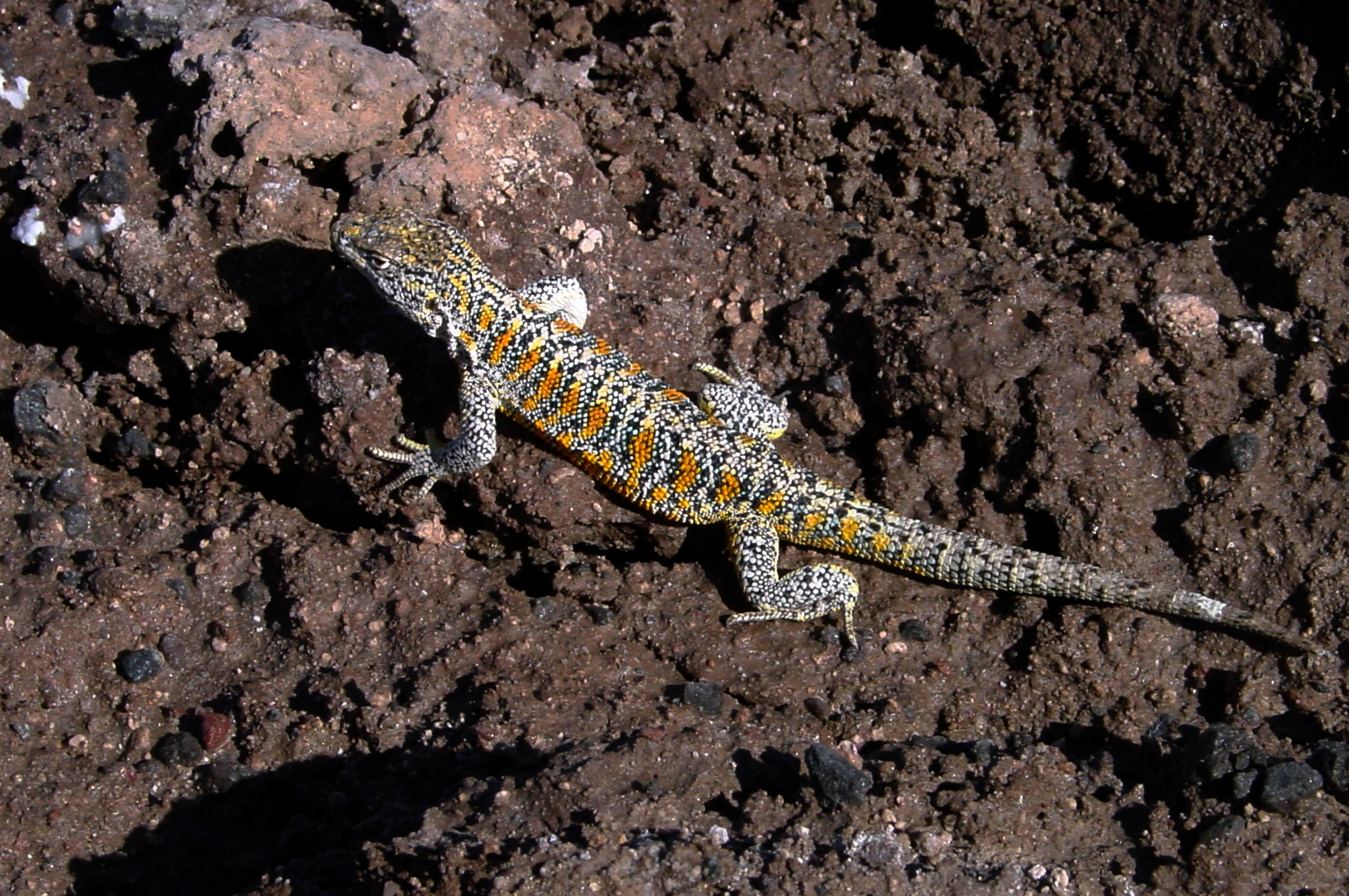 Lézard de Fabian (Liolaemus fabiani), Laguna Chaxa, Salar de Atacama, Chili